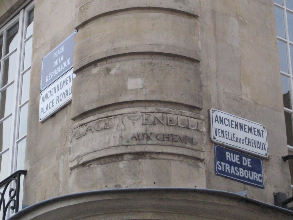 Place de la République à Caen (Calvados) : plaques de rue avec les anciens et nouveaux noms des voies.